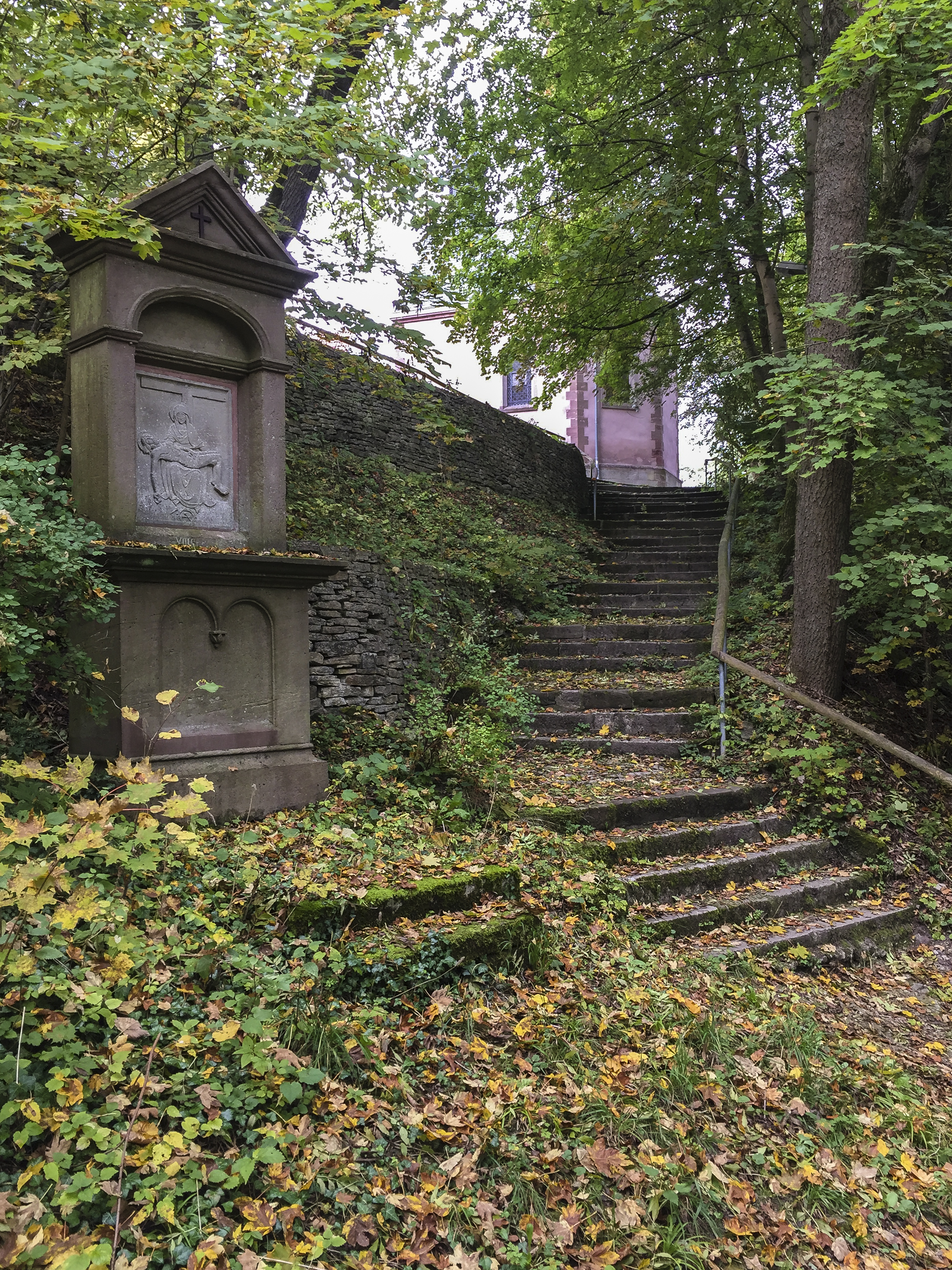 Hülfensberg, Martel an der Treppe zur Kirche